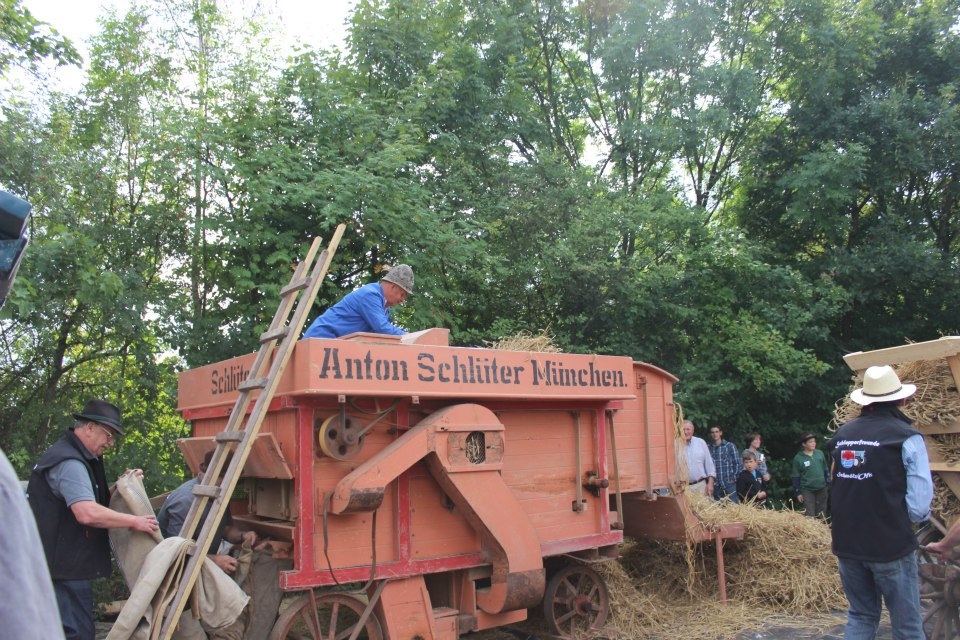 Dreschfest am 1.9.2012 mit einer historischen Dreschmaschine, Küps-Schmölz, Deutschland